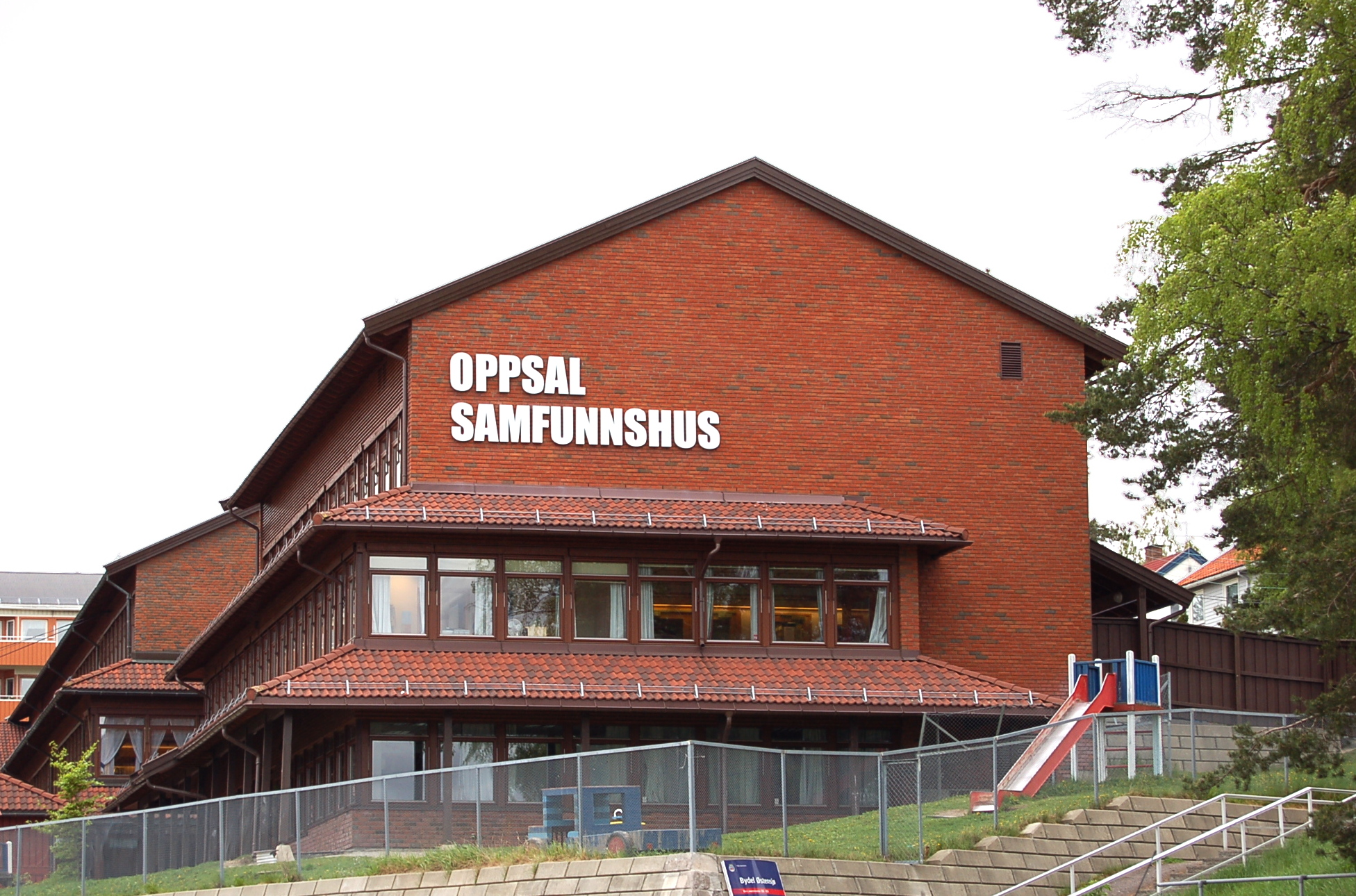 Oppsal samfunnshus, Oslo